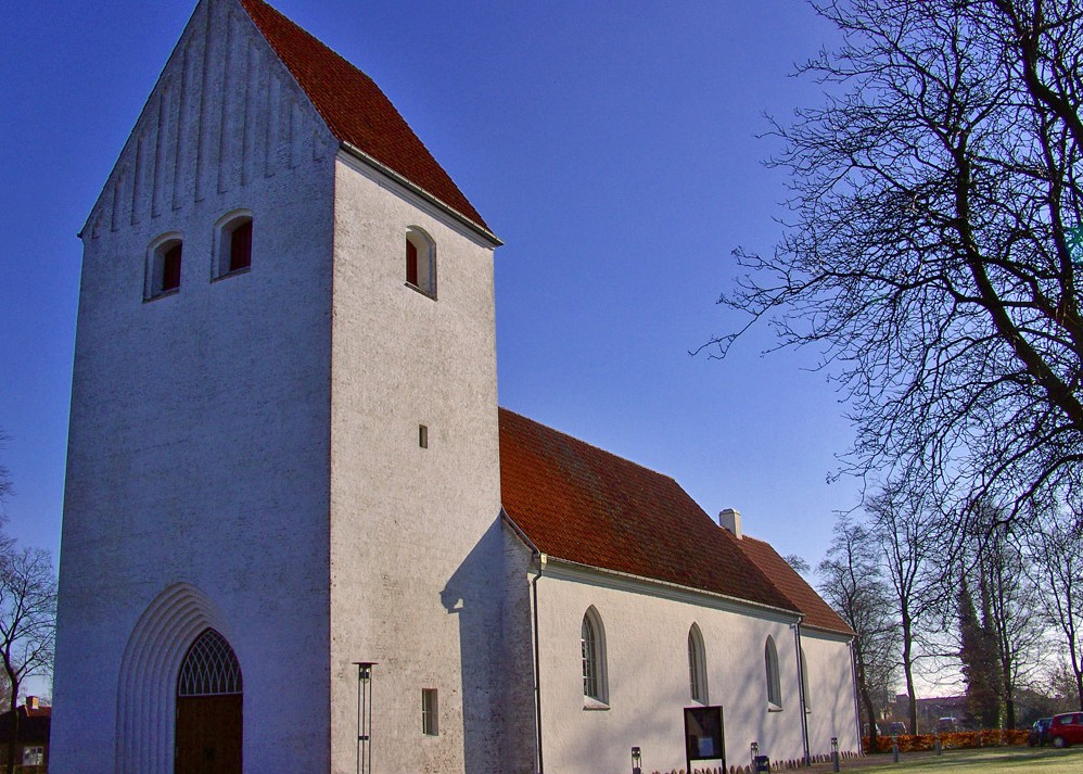 fra sydvest